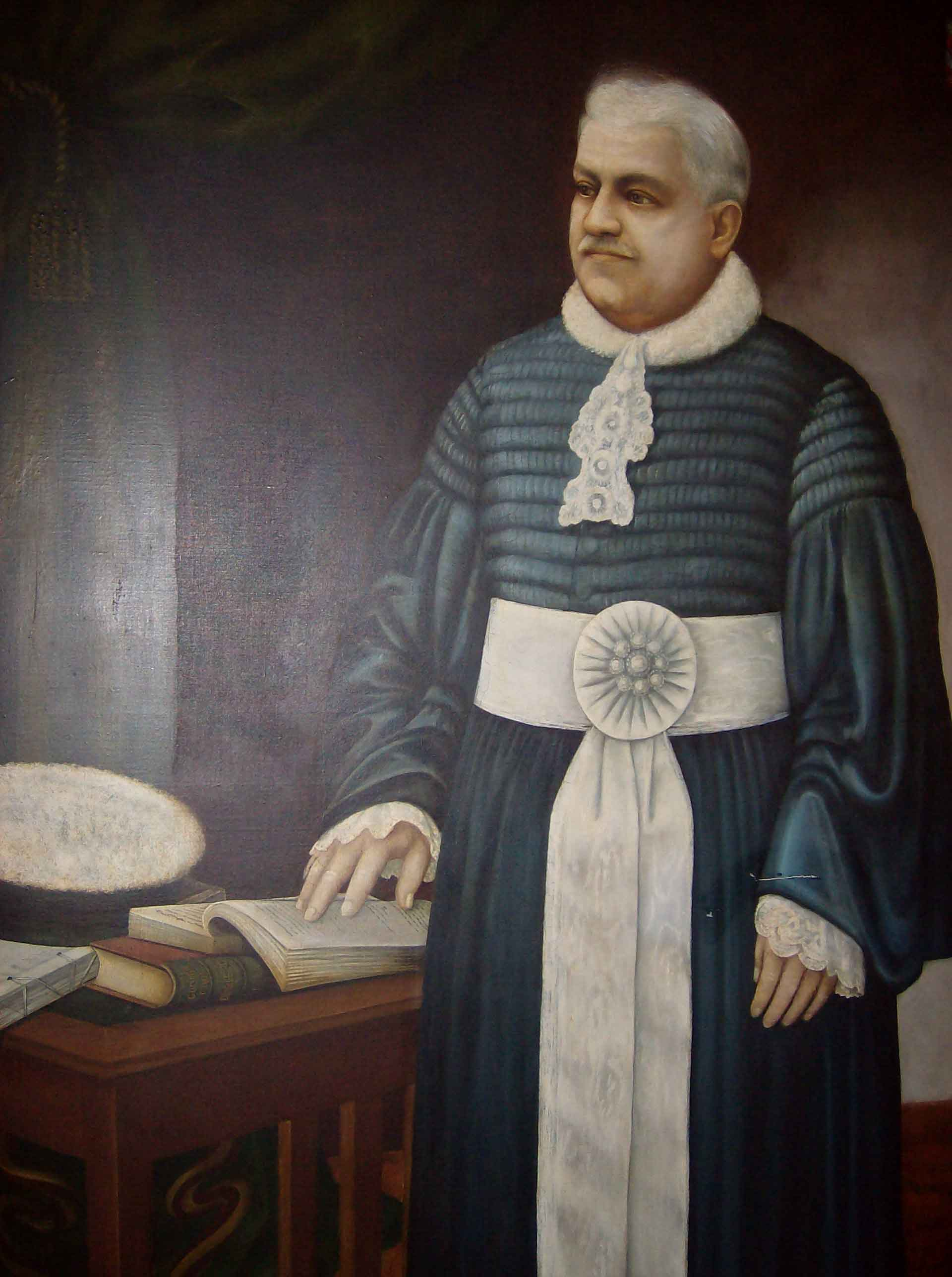 pessoa togada